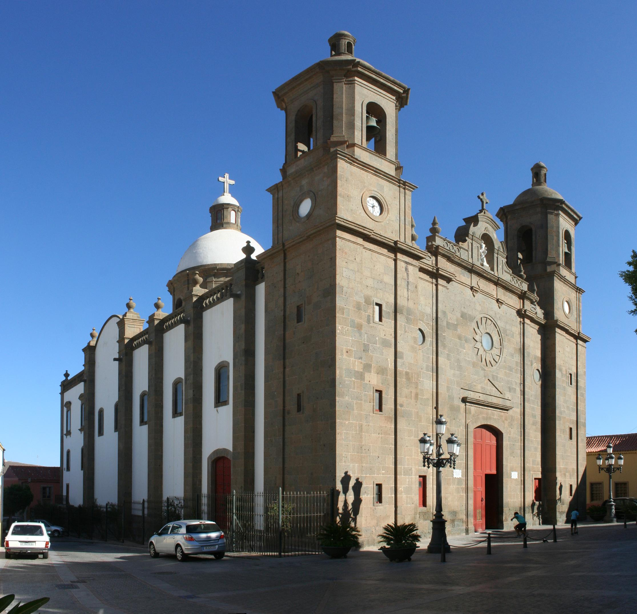 Templo Parroquial de San Sebastián, en el Casco antiguo de Agüimes, Gran Canaria